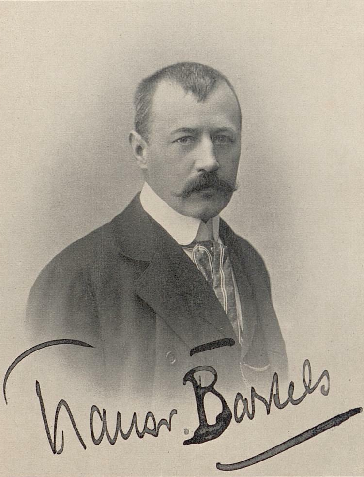 Hans von Bartels 1903, signiert